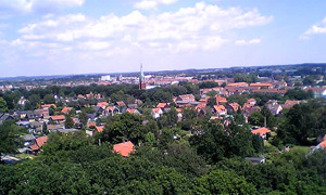 Eslöv, vy från Vattentornet